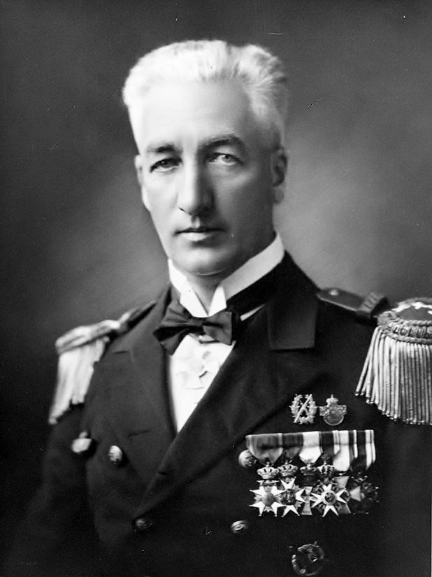 Porträttfotografi av Arvid Flory. Flottiljchef vid Roslagens flygflottilj (F 2). Tillhör F 2-samlingen med nummer F 2 FM 459. Ur Flygvapenmuseums bildarkiv.